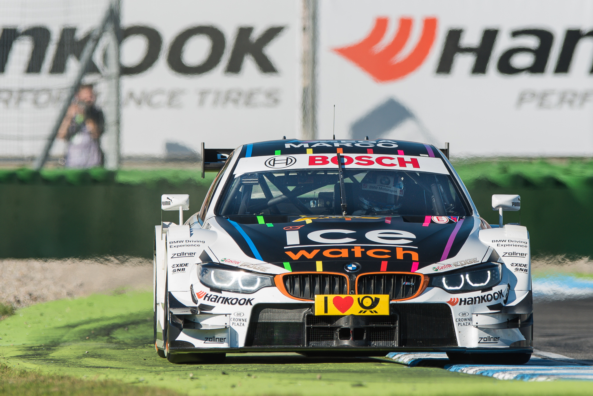 DTM,Deutsche Tourenwagen Masters,Hockenheimring,Ice-Watch BMW M4 DTM,Marco Wittmann,Motorsport,RMG,Reinhold Motorsport GmbH